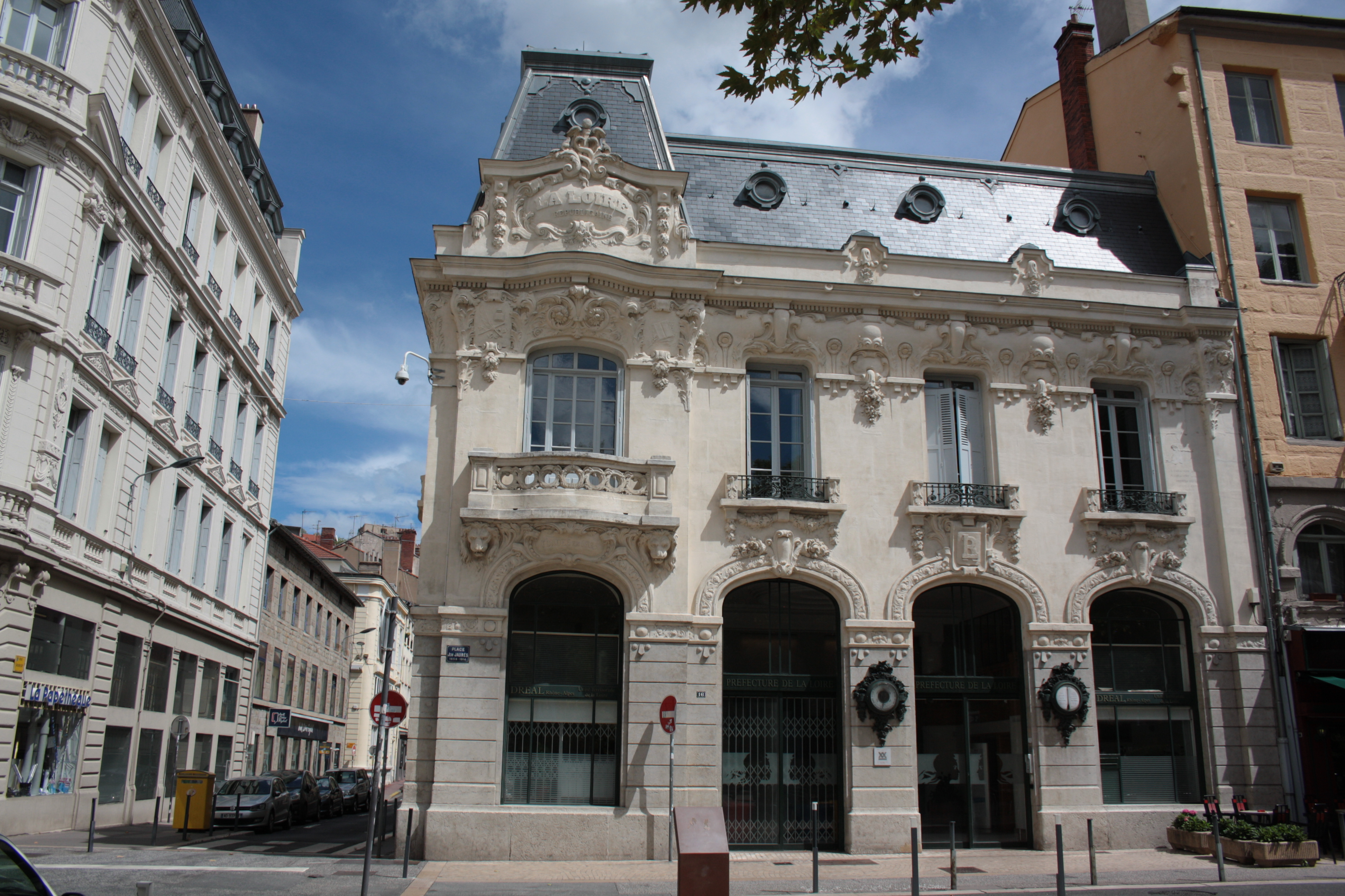 Bâtiment de la Loire Républicaine, au 16 place Jean Jaurès à Saint-Étienne (architectes Lamaizière)